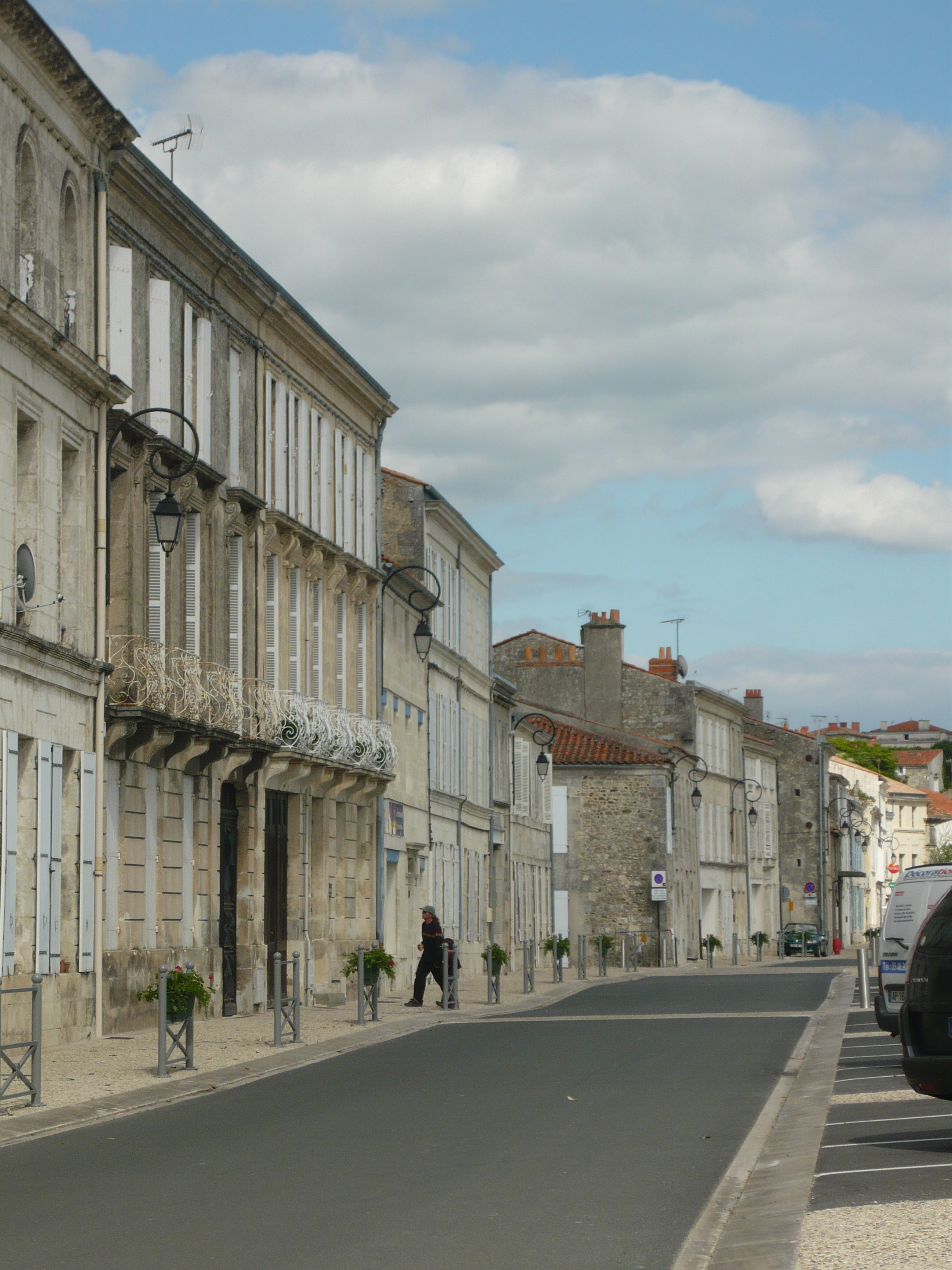 Alignement d'immeubles des quais du port fluvial de Tonnay-Charente